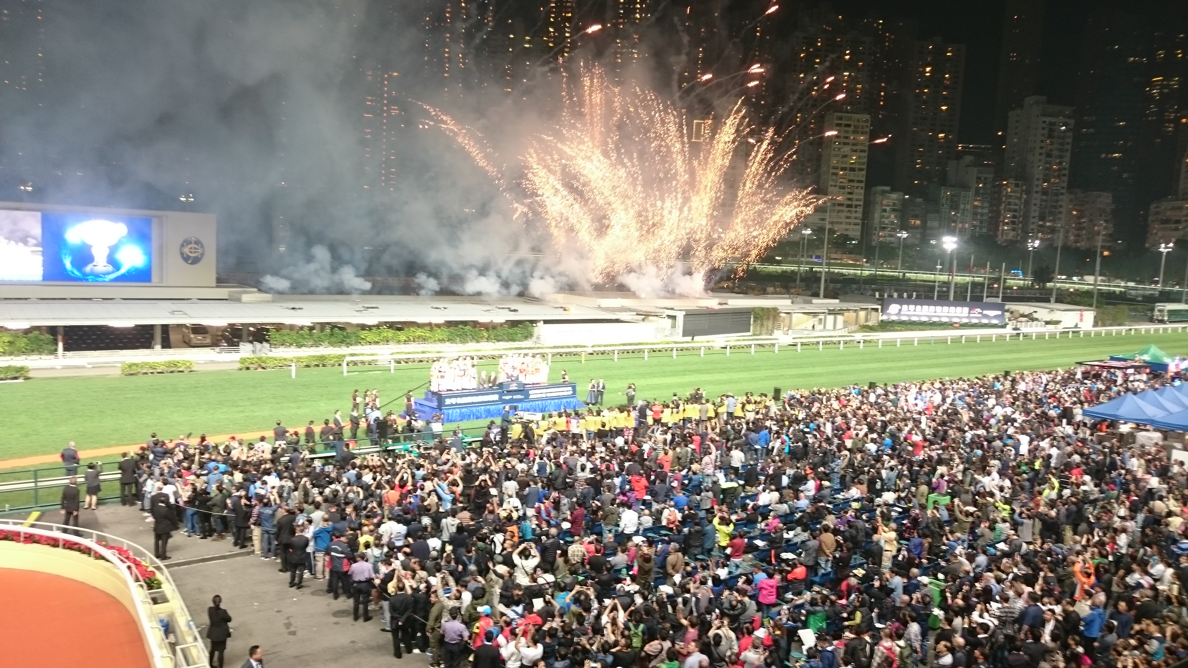 國際騎師錦標賽 2016 開幕煙花儀式